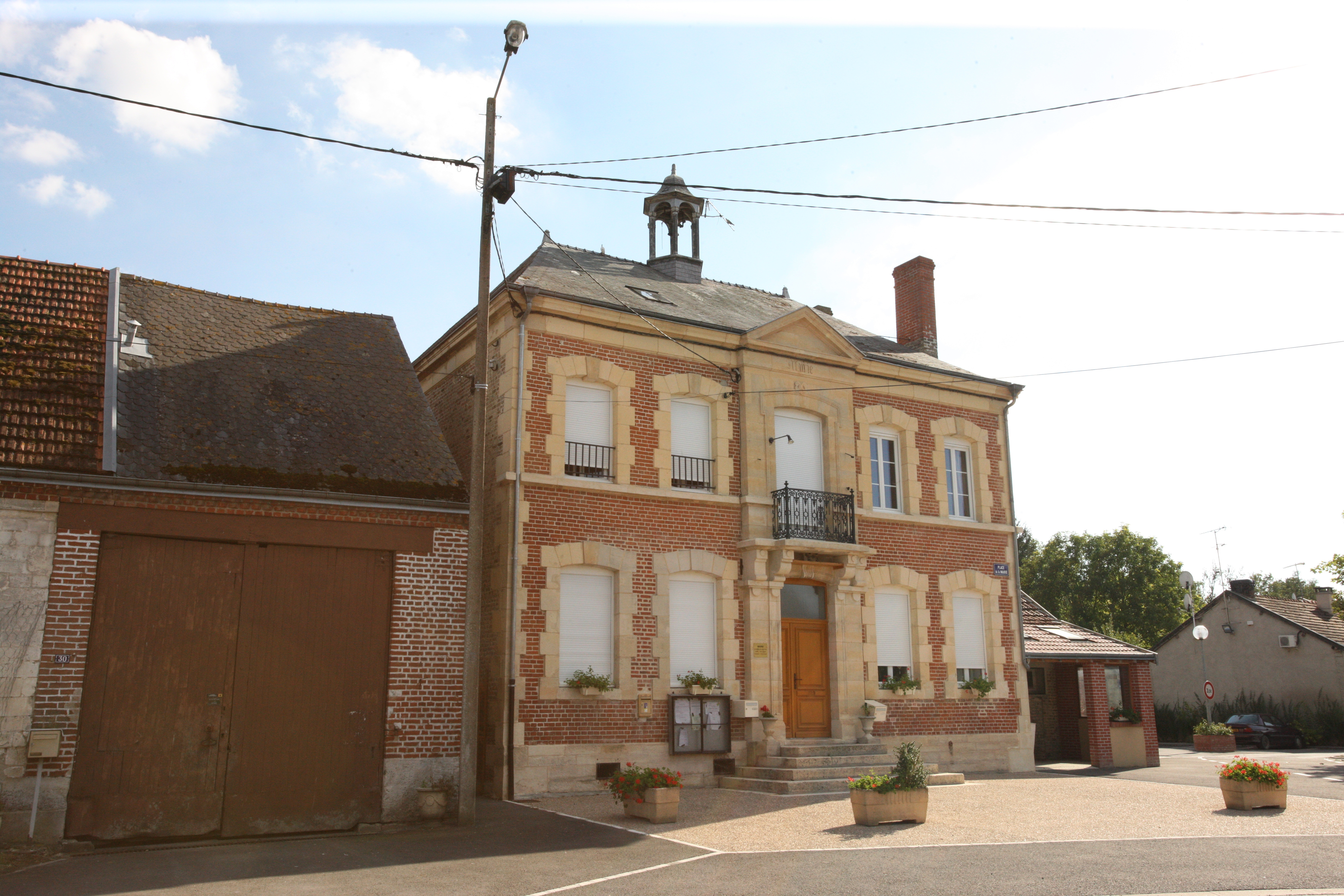 Village Ardennais